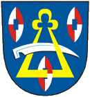 znak obce